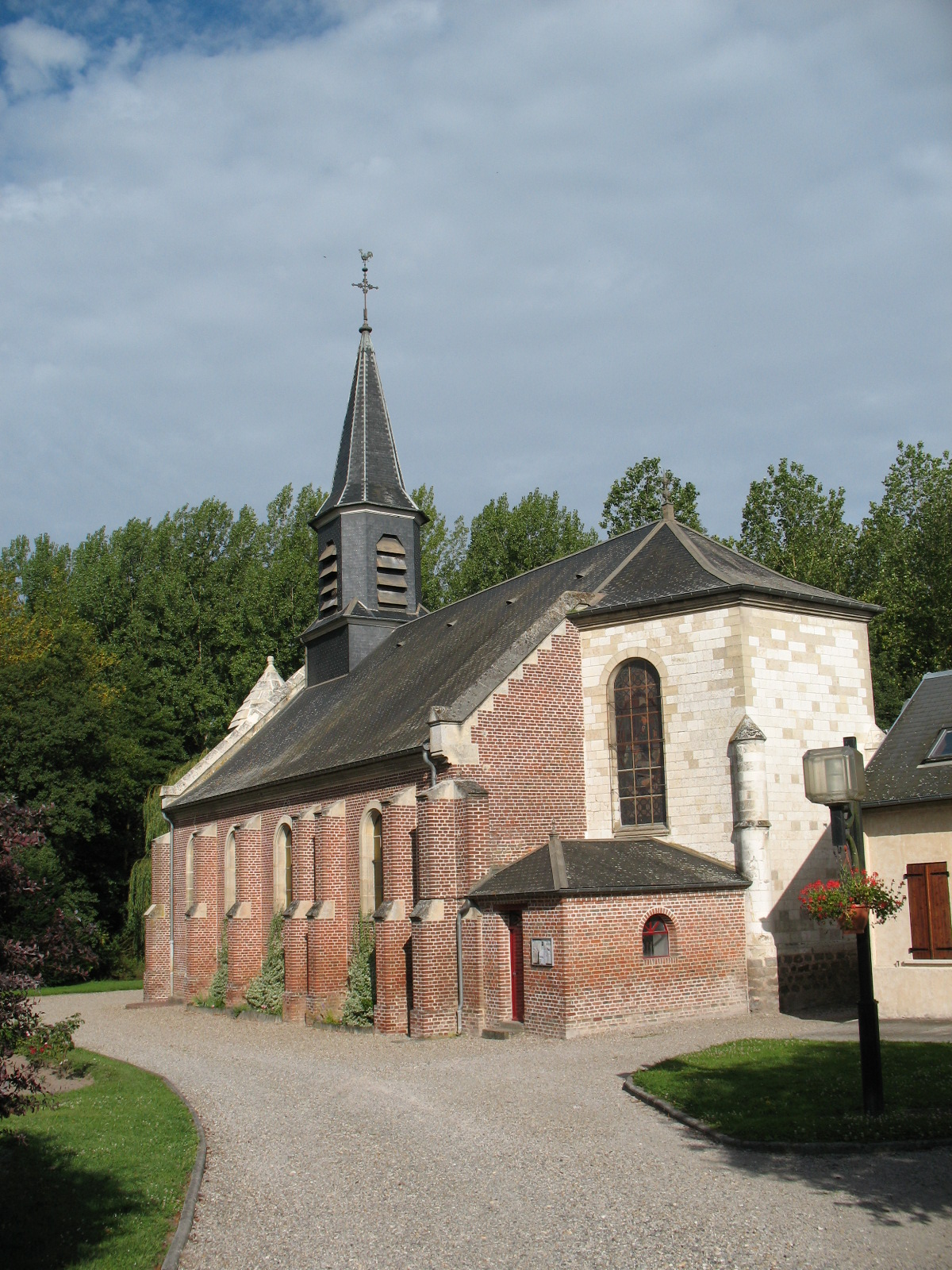 église de Pont-Noyelles vue du sud-est : clocher, muraille sud, sacristie et abside. Construction en pierre et brique.